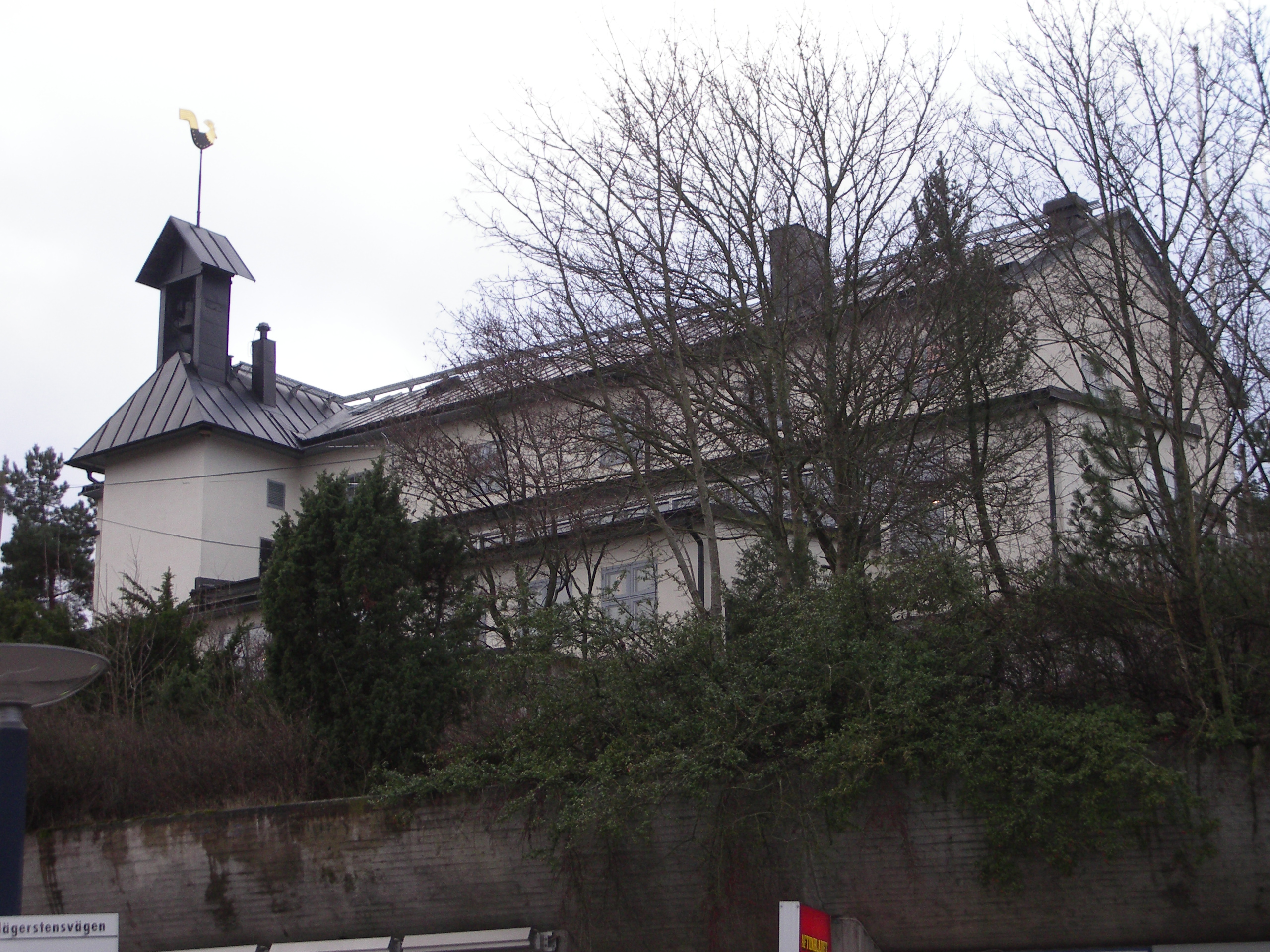 Mälarhöjdens kyrka, Stockholm (1929). Arkitekt: Hakon Ahlberg. Ahlbergs byggnad var ursprungligen mindre och bestod enbart av långskeppet, en stram rektangulär byggnad i 20-talsklassisistisk stil. 1966 byggdes koret ut, också med Ahlberg som arkitekt. 1989-90 gjordes ytterligare en utbyggnad för att tillföra församlingslokaler (den främre byggnadskroppen på fotot).